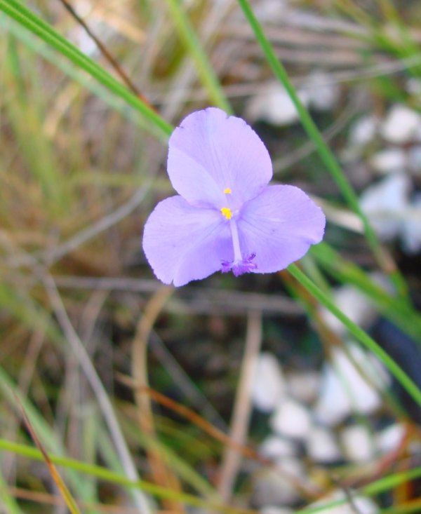 Abolboda pulchella -XYRIDACEAE Chapada dos Veadeiros, Cavalcante - Goiás - Brasil